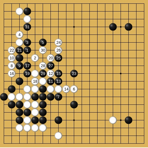 梶原武雄-(先番)橋本宇太郎 216手白中押勝